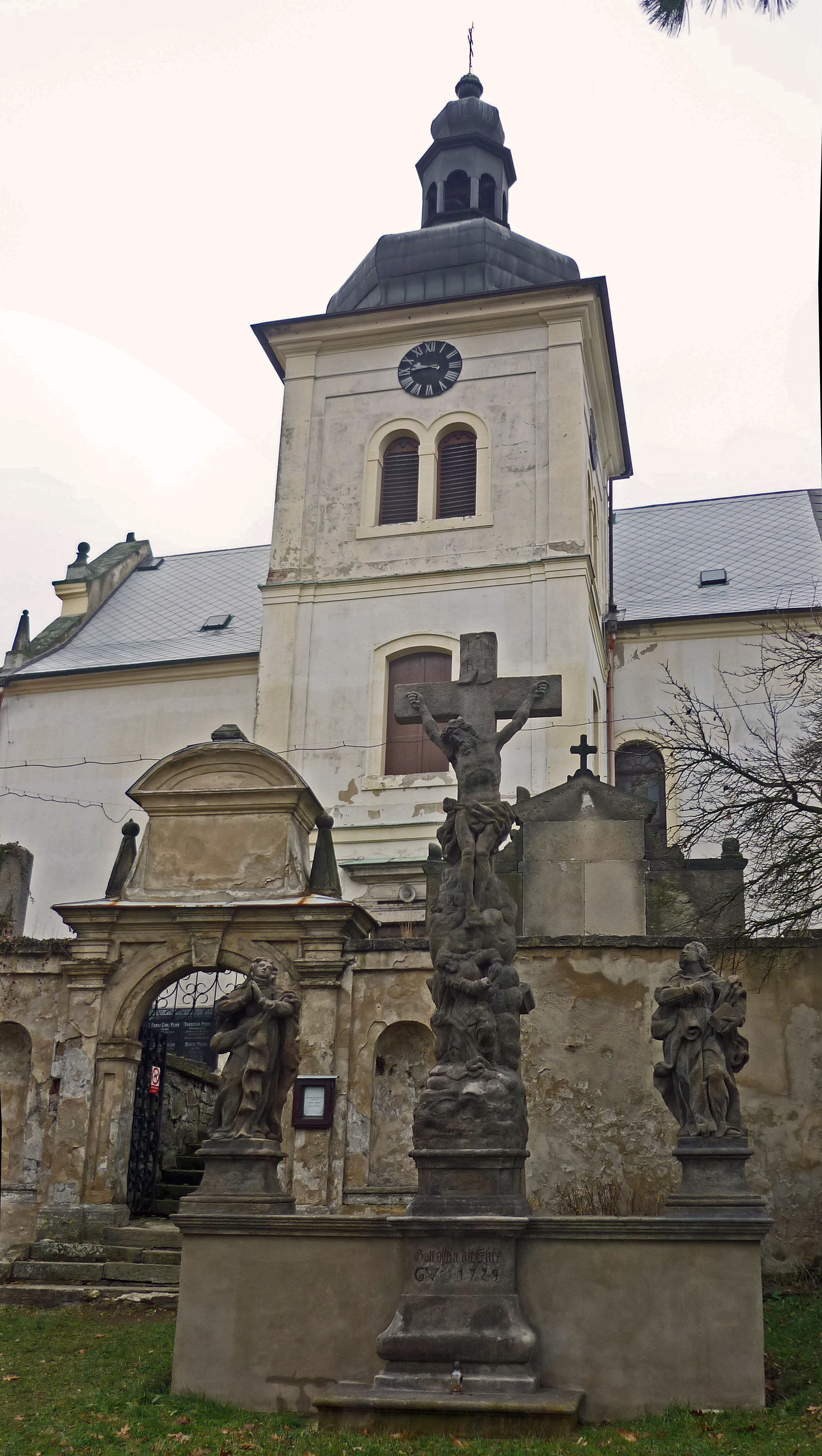 Dreikönigskirche in Königswald (Libouchec)